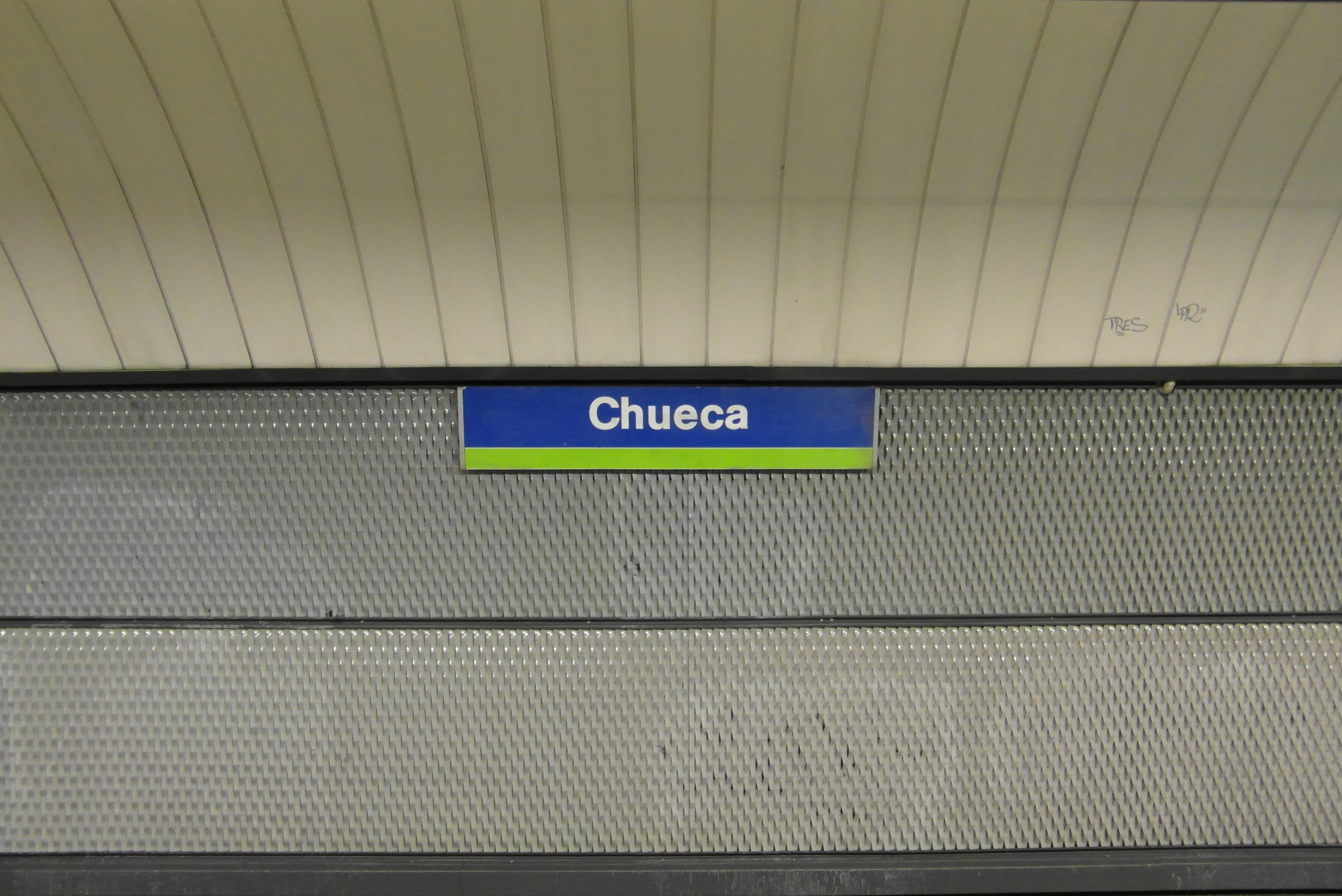 Madrid - Metro - Estación de Chueca